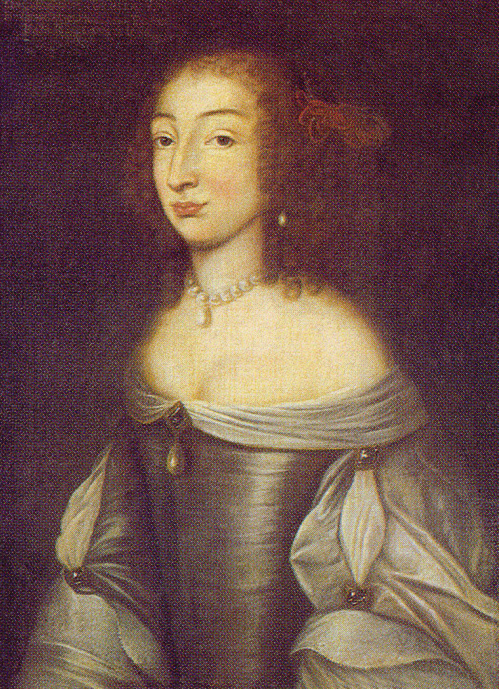 Katalog Liselotte von der Pfalz Nr. 6